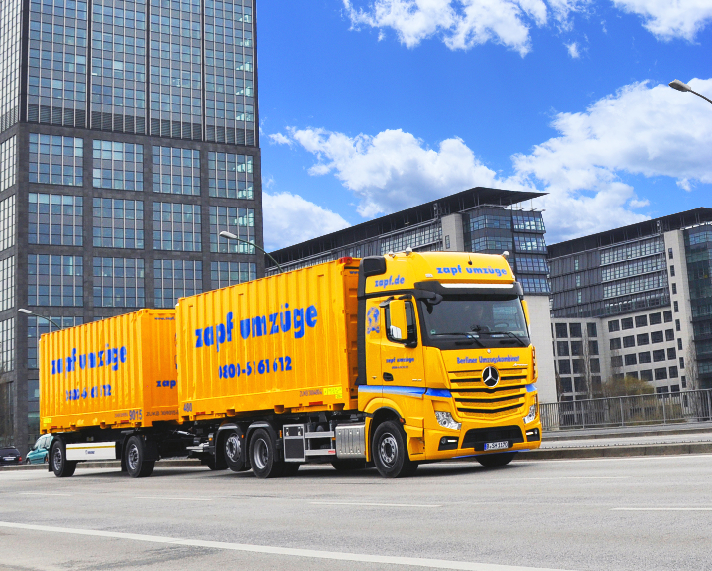 zapf umzüge AG, 1975 gegründete internationale Umzugsfachspedition mit Sitz in Berlin und Filialen in sieben weiteren Städten. LKW der Firma.